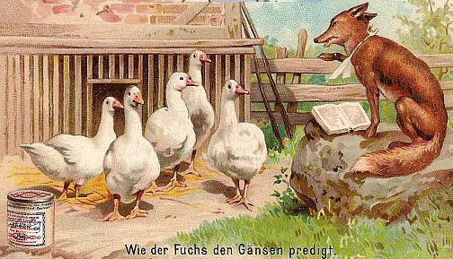 Liebig-Sammelkarte "Wie der Fuchs den Gänsen predigt", Detail; wohl aus einem Set "Sprichwörter" o. ä.